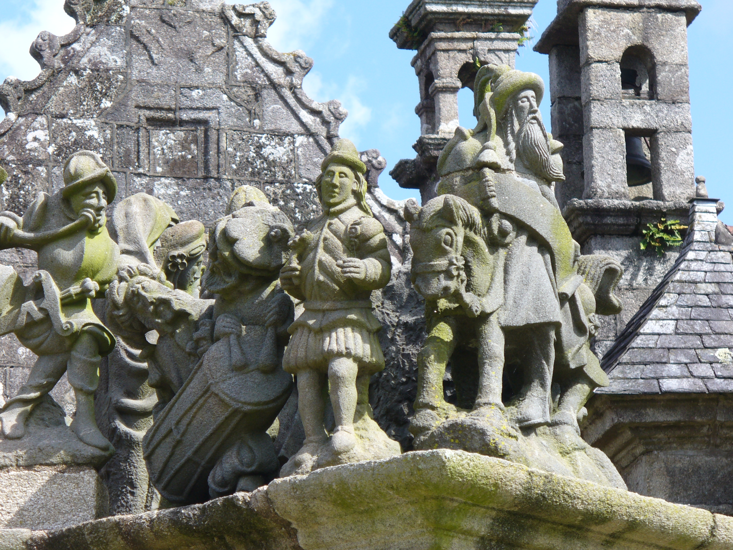 Calvaire-Kalvarienberg von Saint Miliau in Guimiliau zwischen 1581 und 1588 errichtet zeigt mit insgesamt 200 Figuren 17 Passionsszenen im Turm und im Fries 15 Szenen aus dem Leben Jesu.-Enclos Paroissal-Umfriedeter Pfarrbezirk